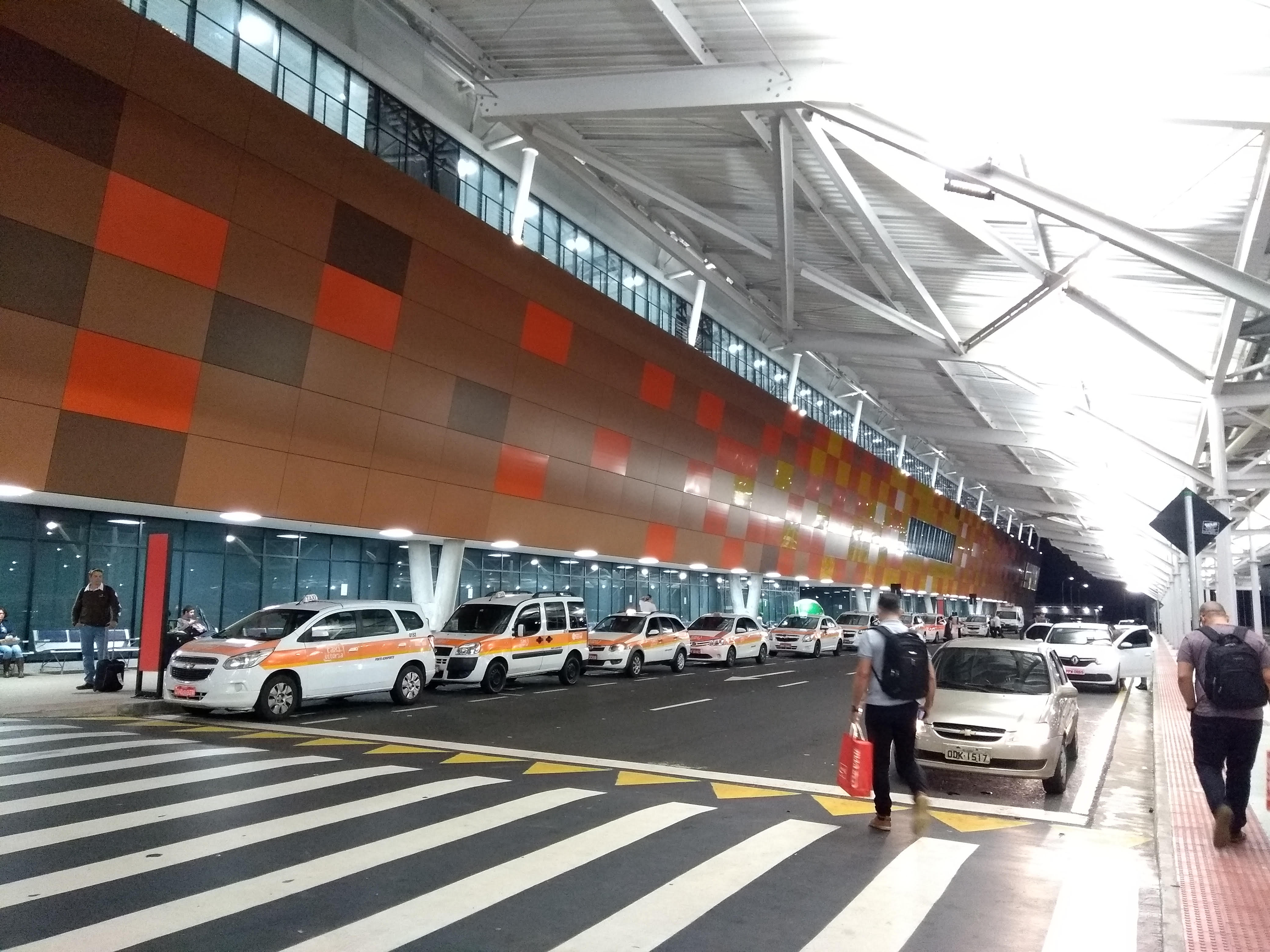 Novo terminal de passageiros do Aeroporto de Vitória - Eurico de Aguiar Salles, em 13 de junho de 2018.